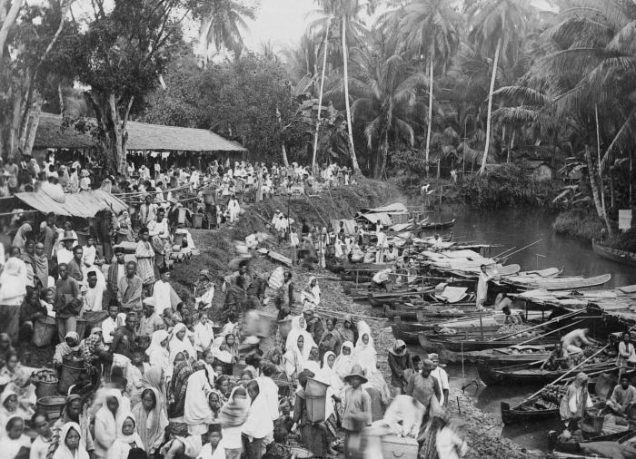 Repronegatief. Markt aan de rivier bij Pantaihambawang in Kalimantan